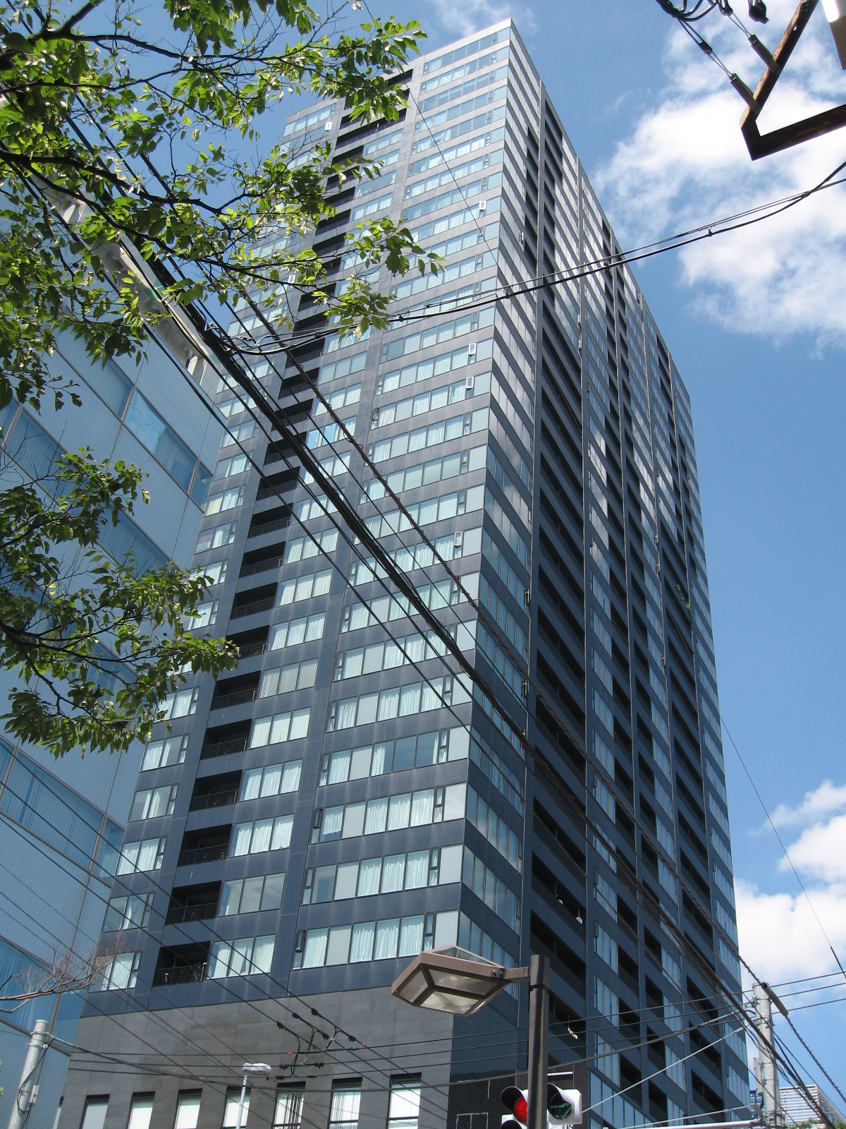 新潟県新潟市中央区。LEXN1の画像。